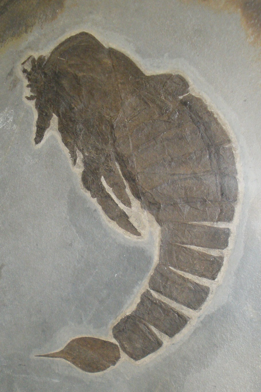 Fossil of Slimonia, an extinct arthropod- Took the photo at Senckenberg Museum of Frankfurt